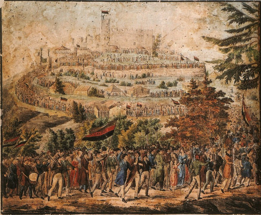 Der Zug zum Hambacher Schloss am 27. Mai 1832. Kolorierte Federlithographie, um 1832.